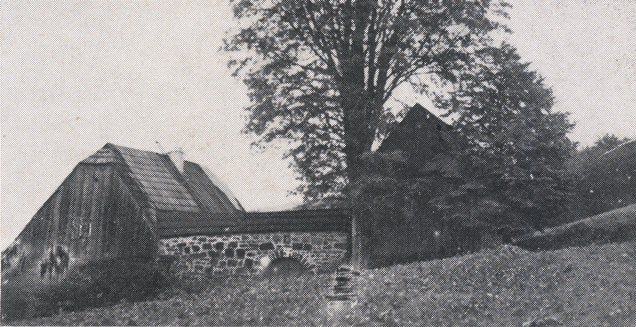 Richard Franke, Rauchwarenveredler und -händler, Autobiographie, 1971. Bildunterschrift: Hof Steinhübel, Pohldorf.